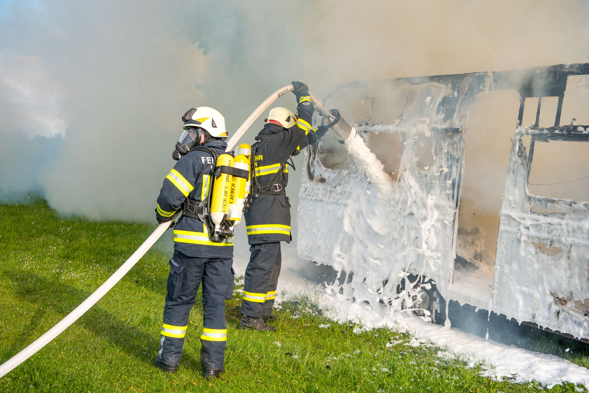 Der brennende Wohnanhänge wird mittels Mittelschaumrohr gelöscht - Übung der Feuerwehren im Bereich der Gemeinde Feldkirchen an der Donau in Oberösterreich